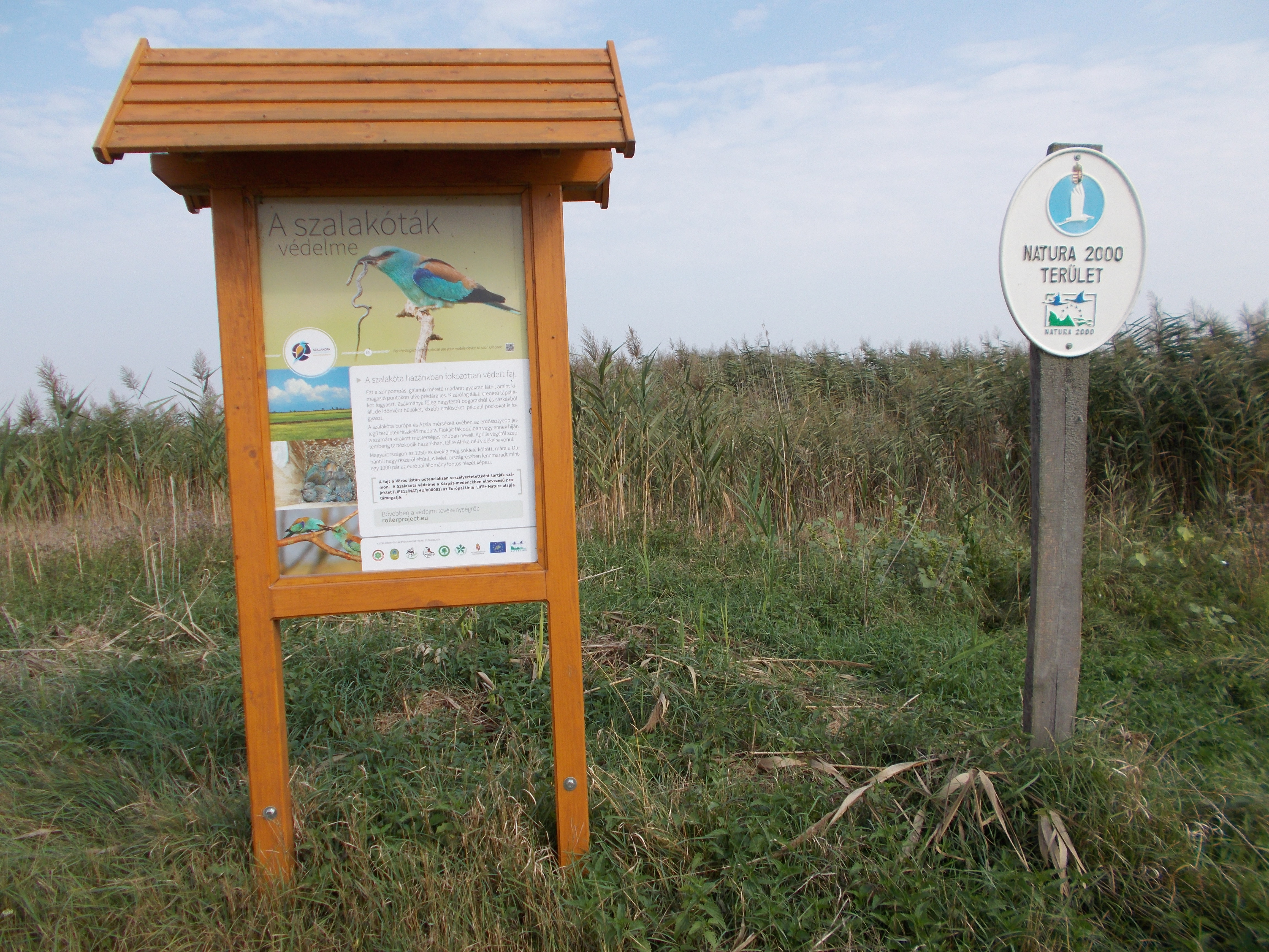 Gátéri Fehér-tó túl-ololdala már Gátér.